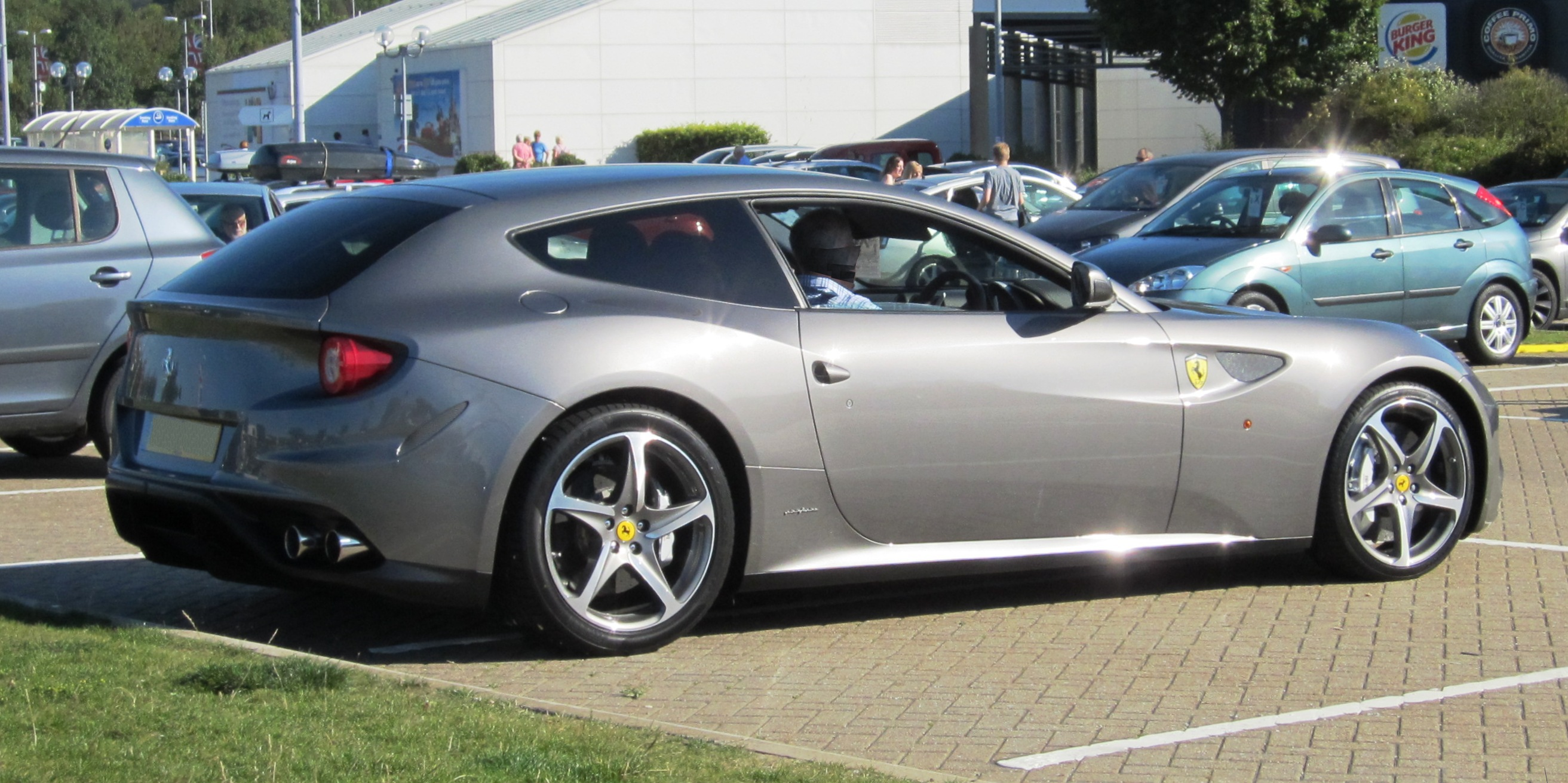 Ferrari FF 2012